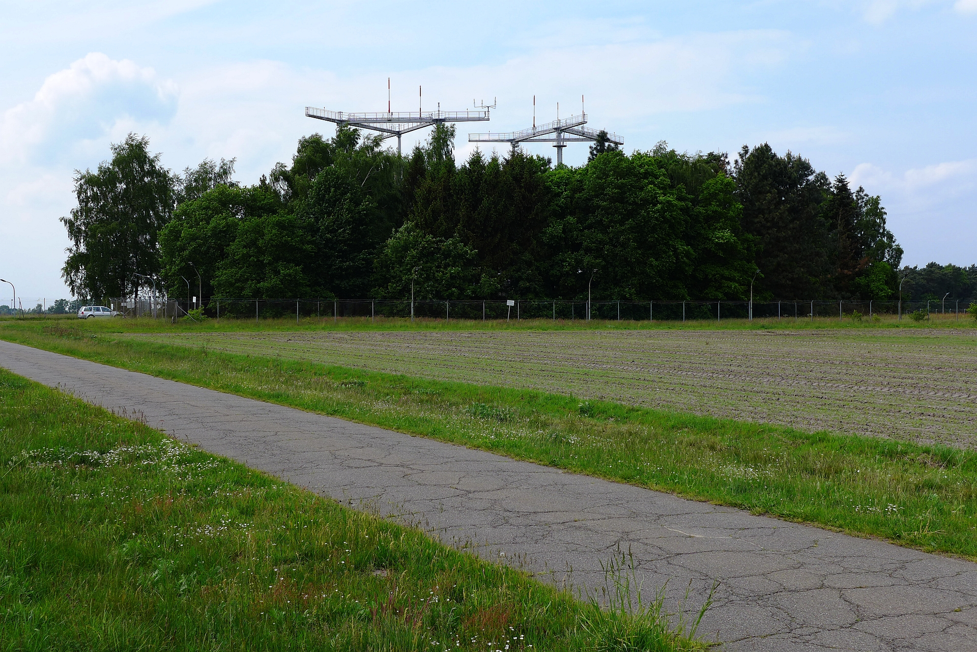 Radaranlage der Bundeswehr am Dorfrand von Hiddingen. Aufnahmedatum 2015-05.